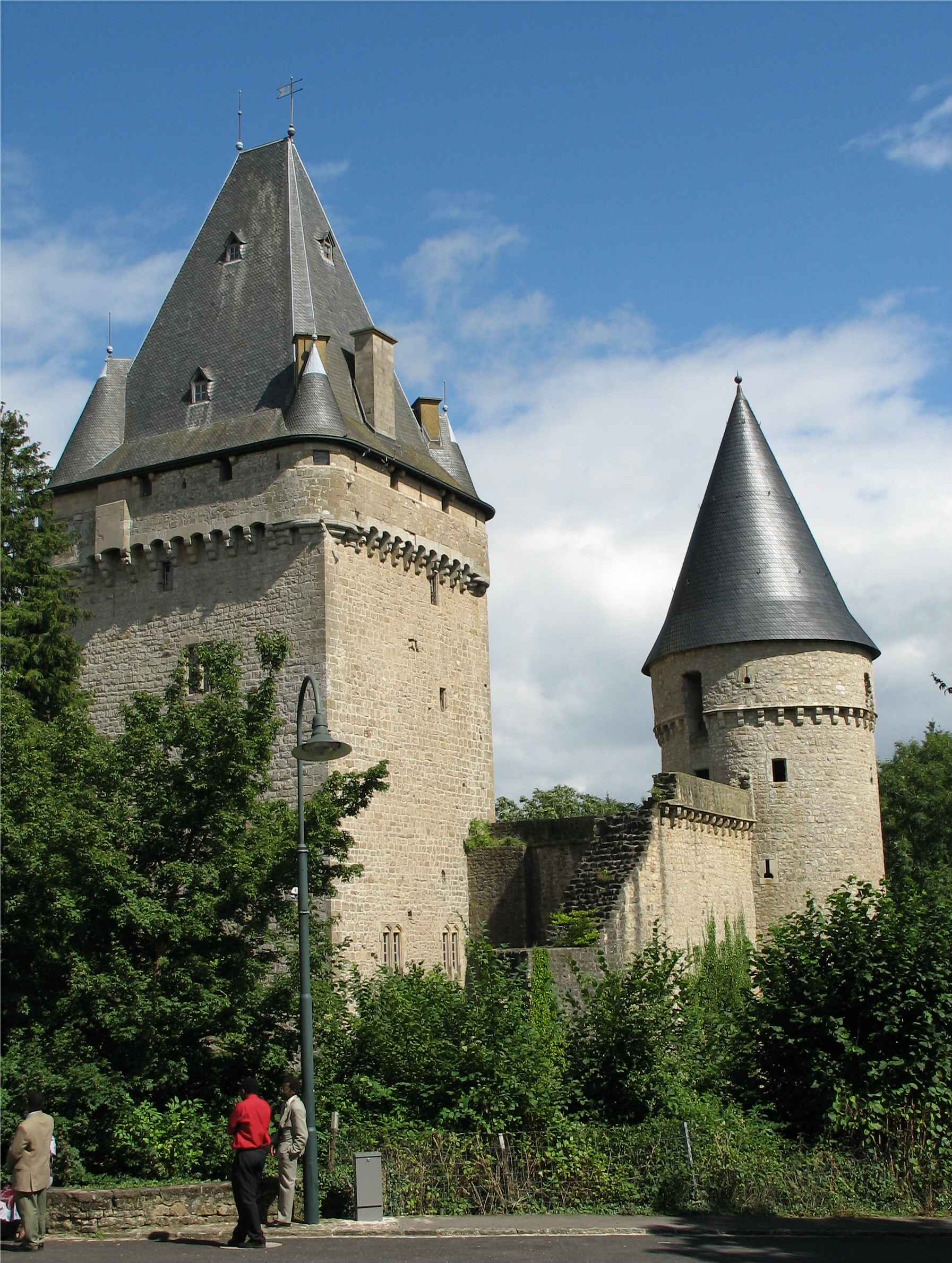 Le château de Hollenfels (Luxembourg)